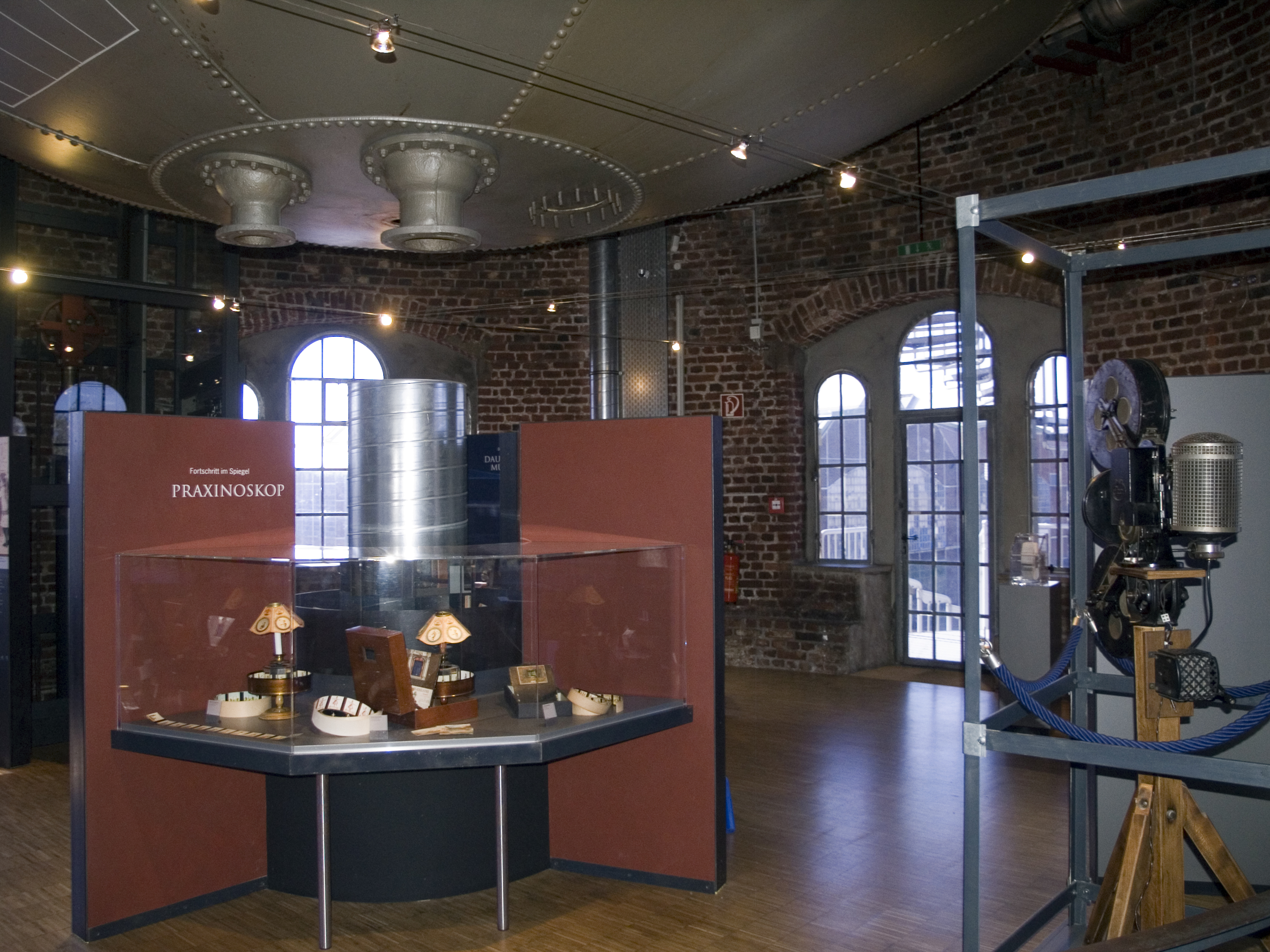 Музей предыстории кино в камере-обскуре (г. Мюльхайм-на-Руре, Северный Рейн-Вестфалия)